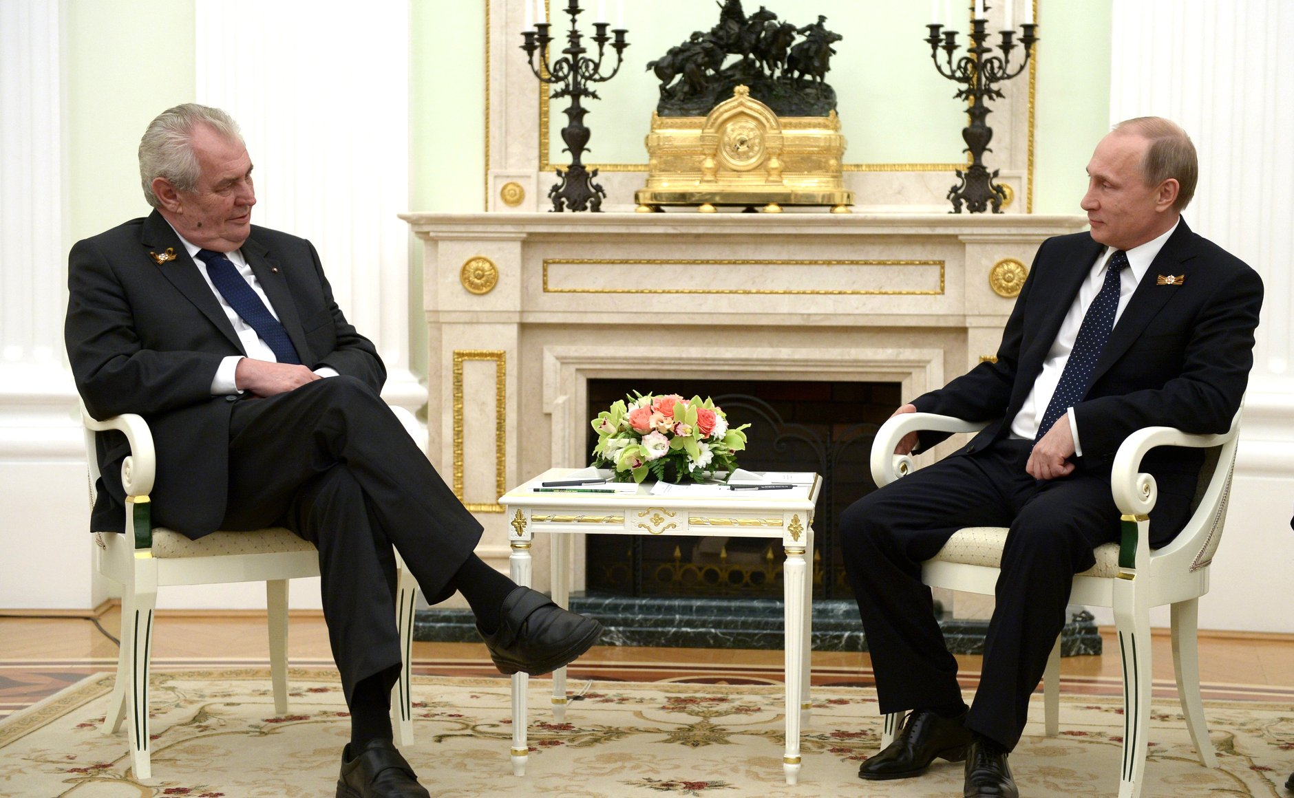 Встреча Владимира Путина с Президентом Чехии Милошем Земаном